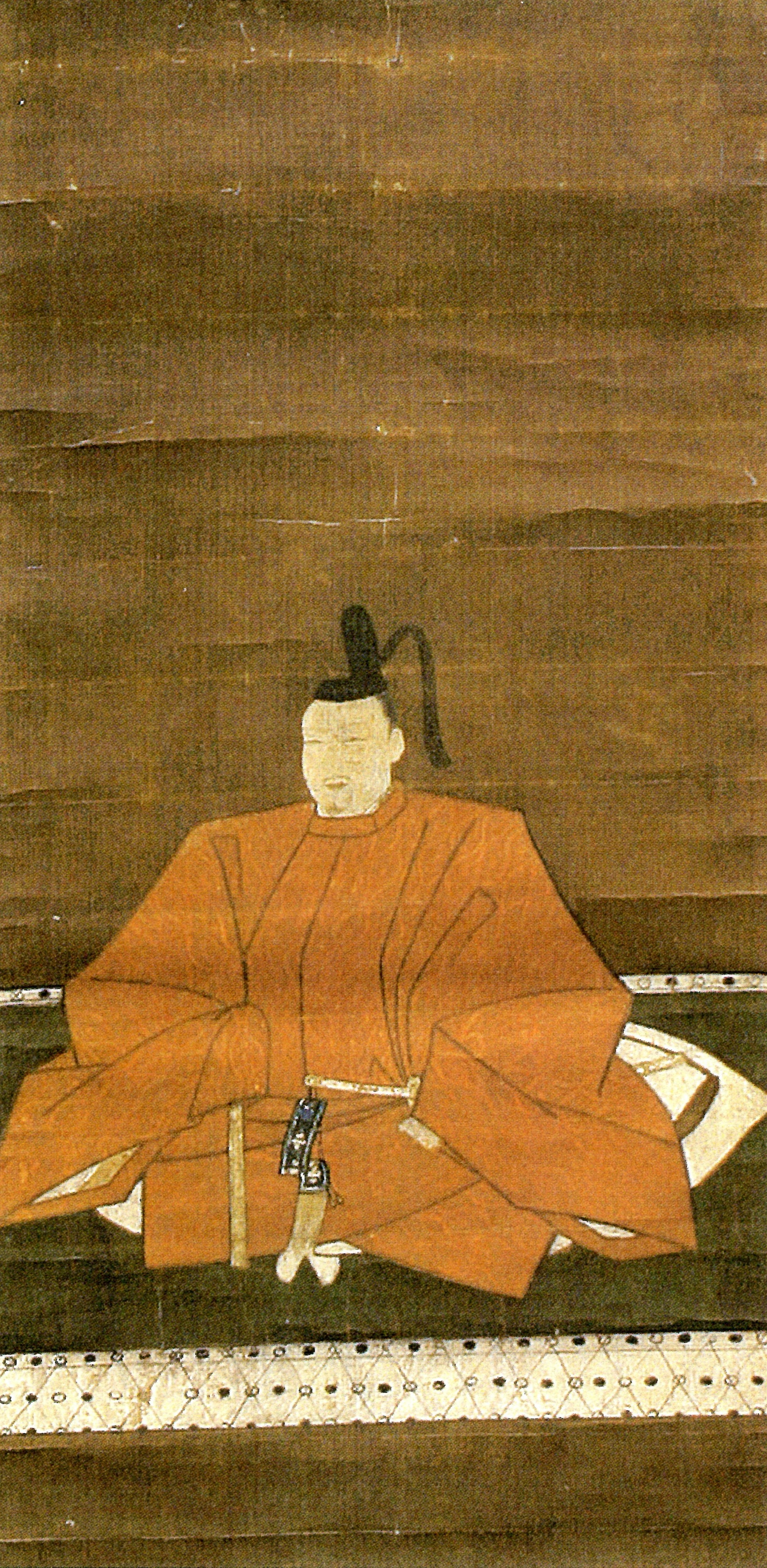 平塚為広の肖像。